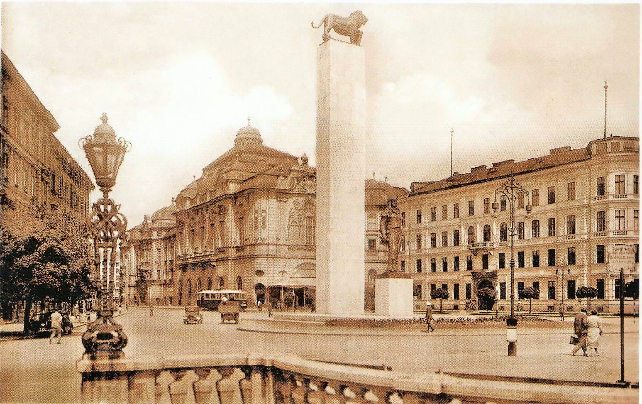 Bratislava, Slowakei